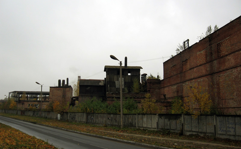 Вид на территорию завода Львовсельмаш